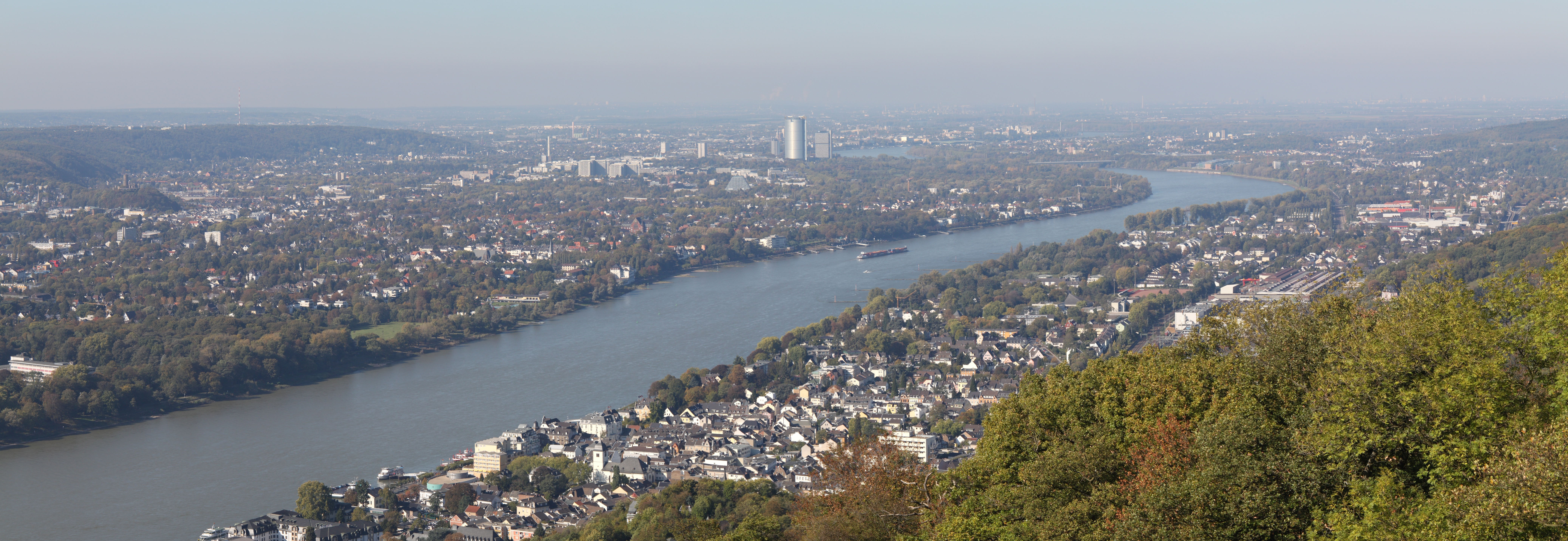 Blick vom Drachenfels (Siebengebirge)